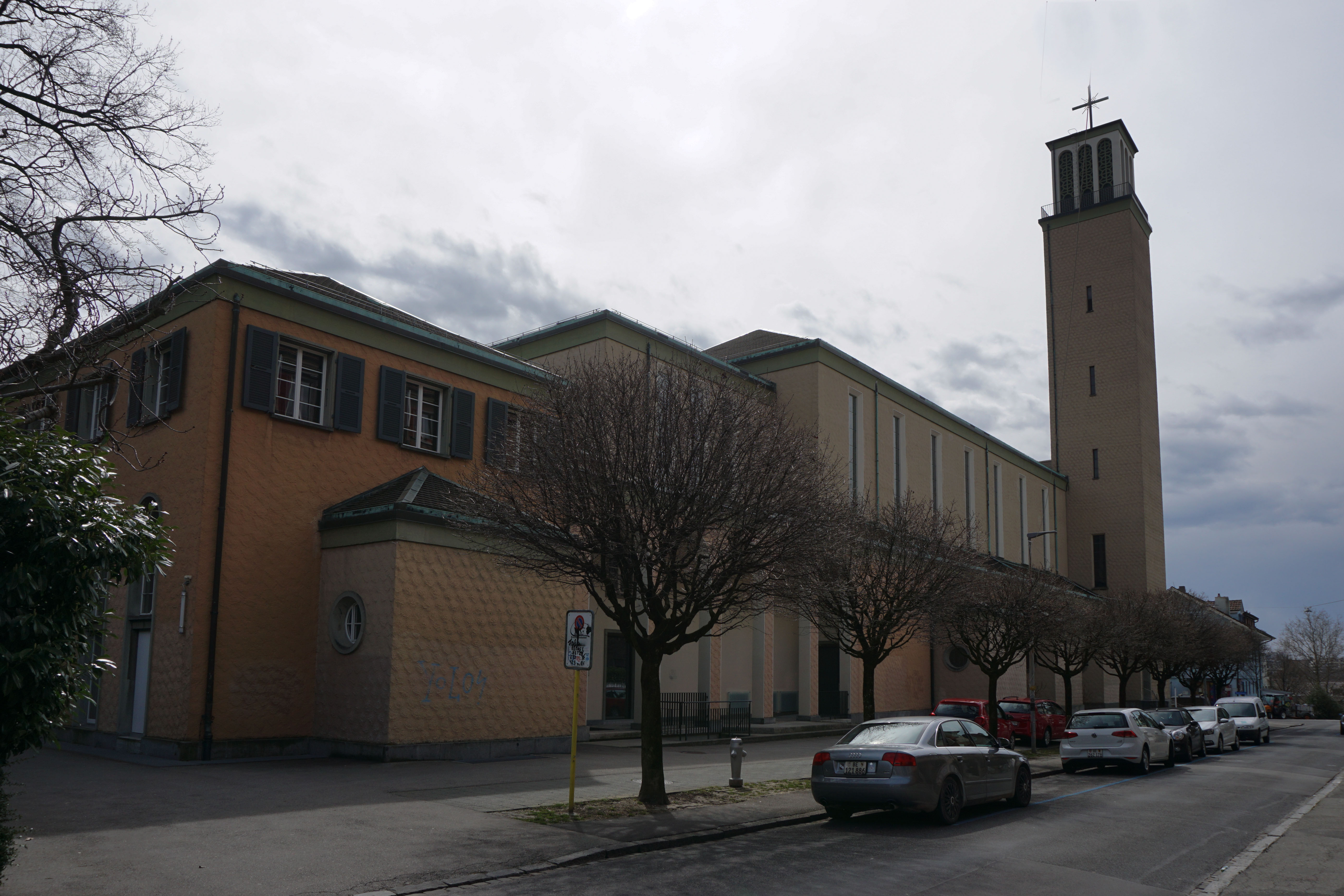 Marienkirche, Nordseite von Nordost